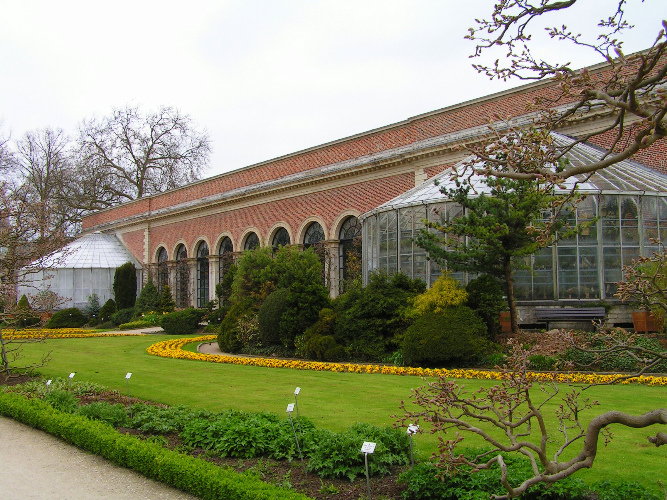 Orangerie Kruidtuin (Hortus Botanicus Lovaniensis) Leuven, Belgium